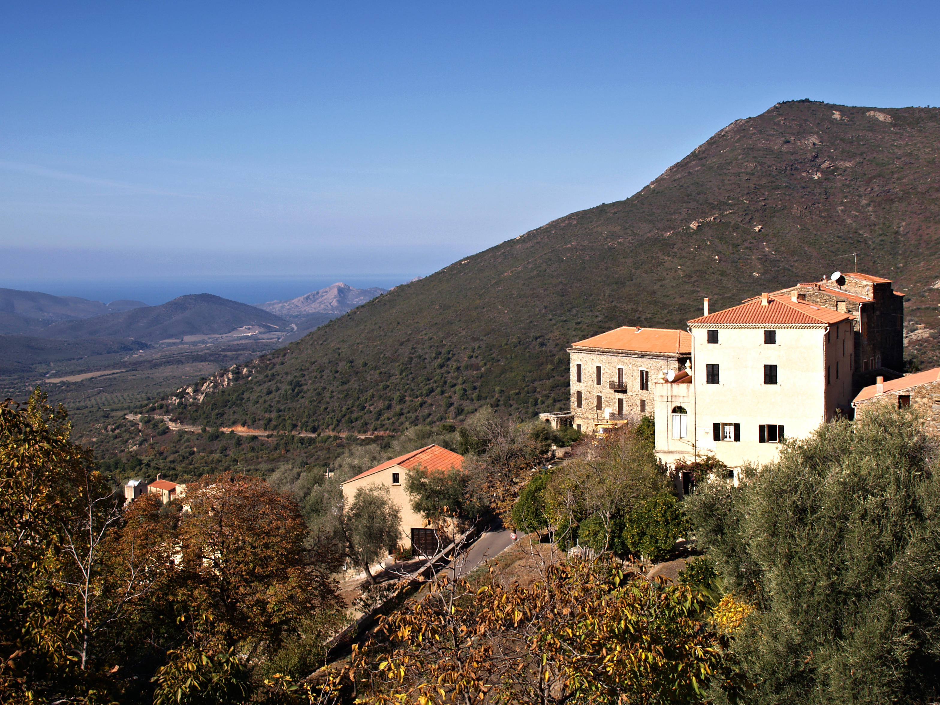 Urtaca (Corsica) - Village balcon